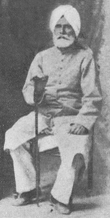 Maulana Altaf Hussain Hali